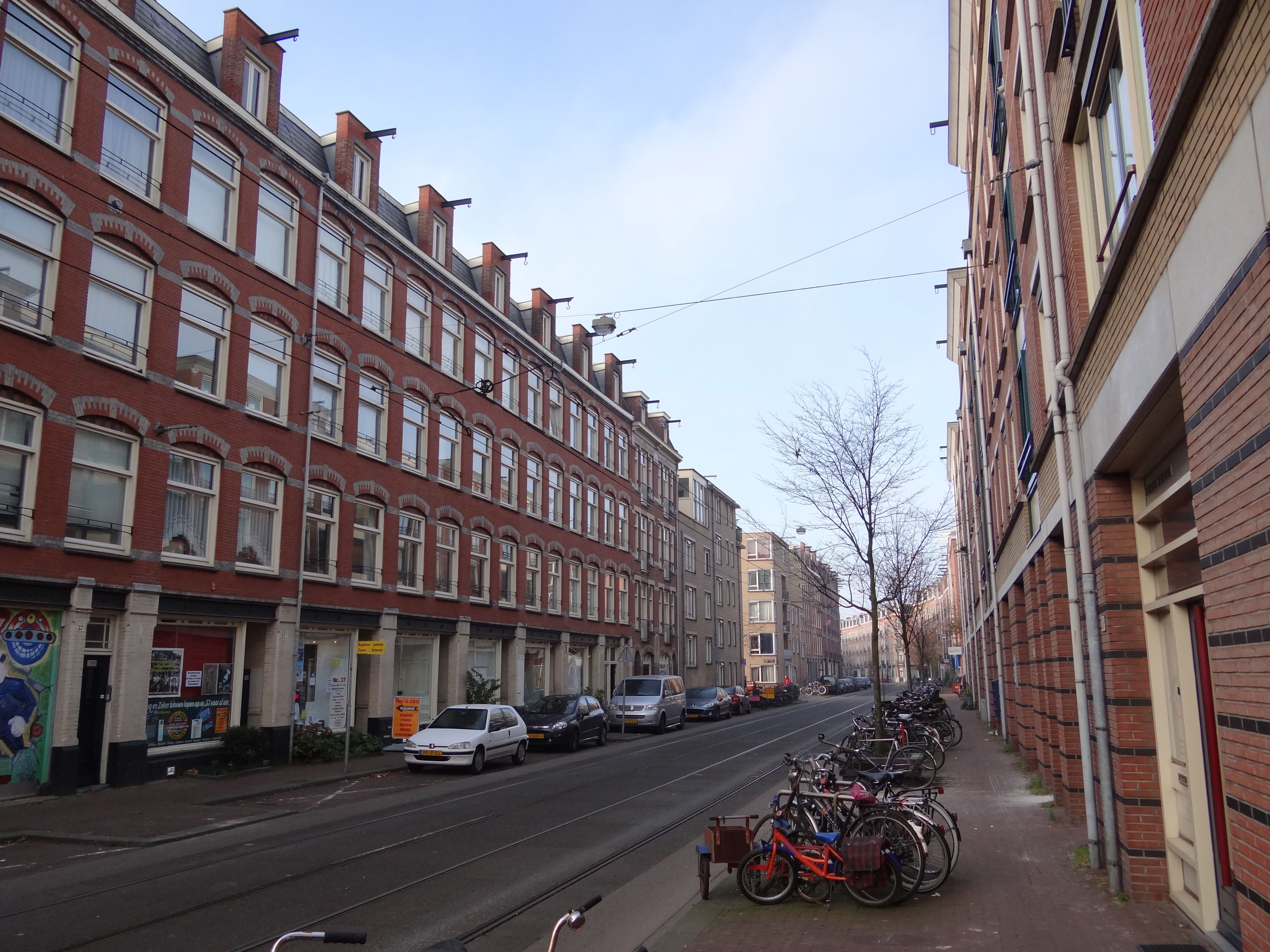 Streets in Amsterdam Van de Hoopstraat Amsterdam